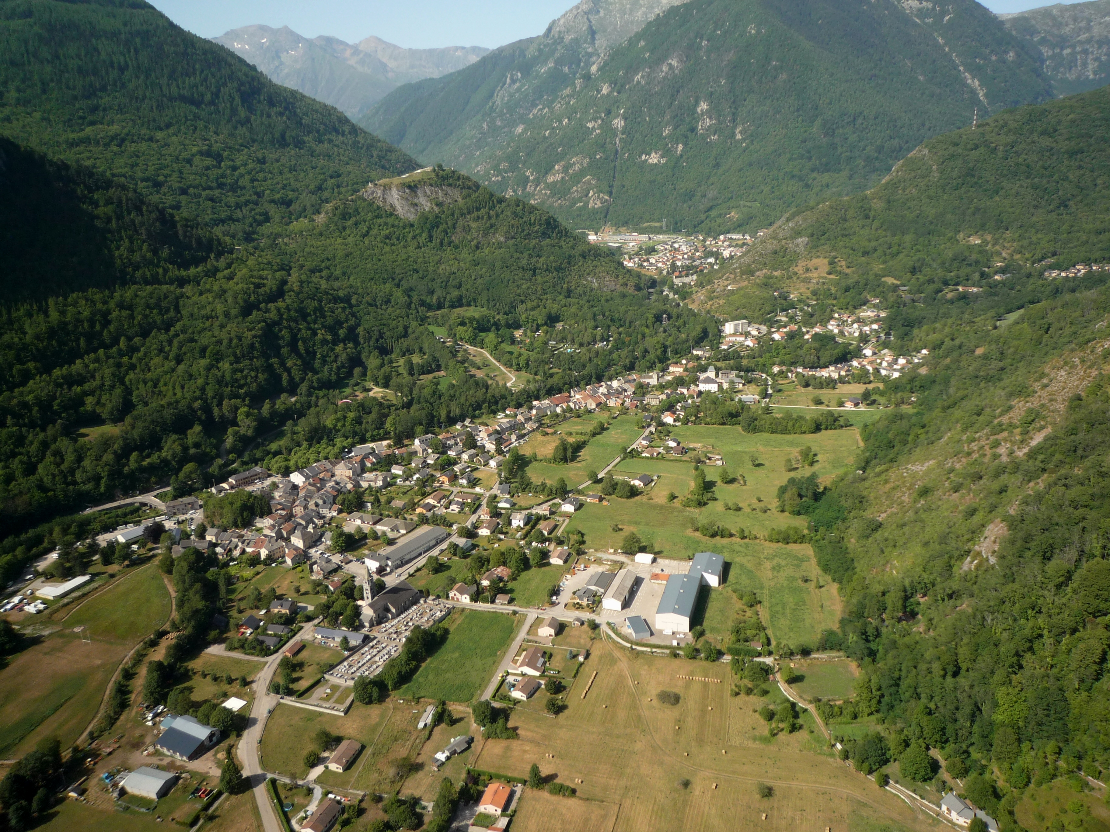 Commune de Vicdessos en Ariège, prise en parapente.